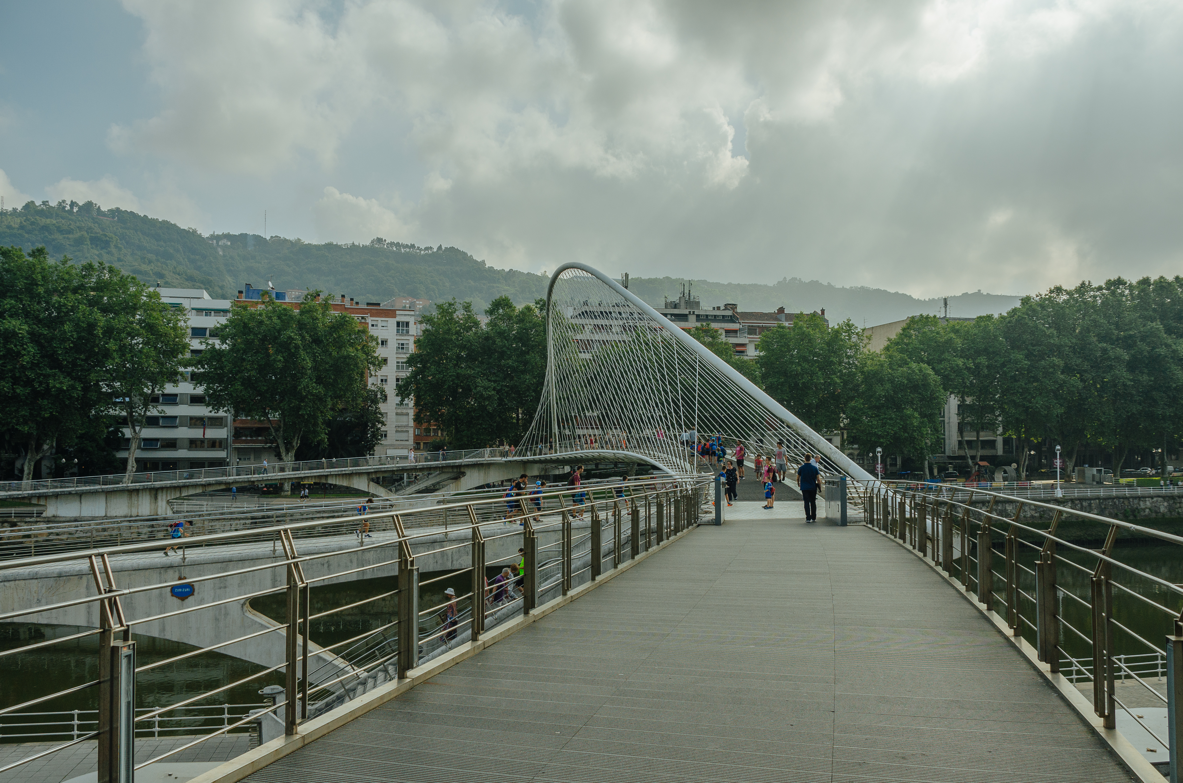 Bilbao-4